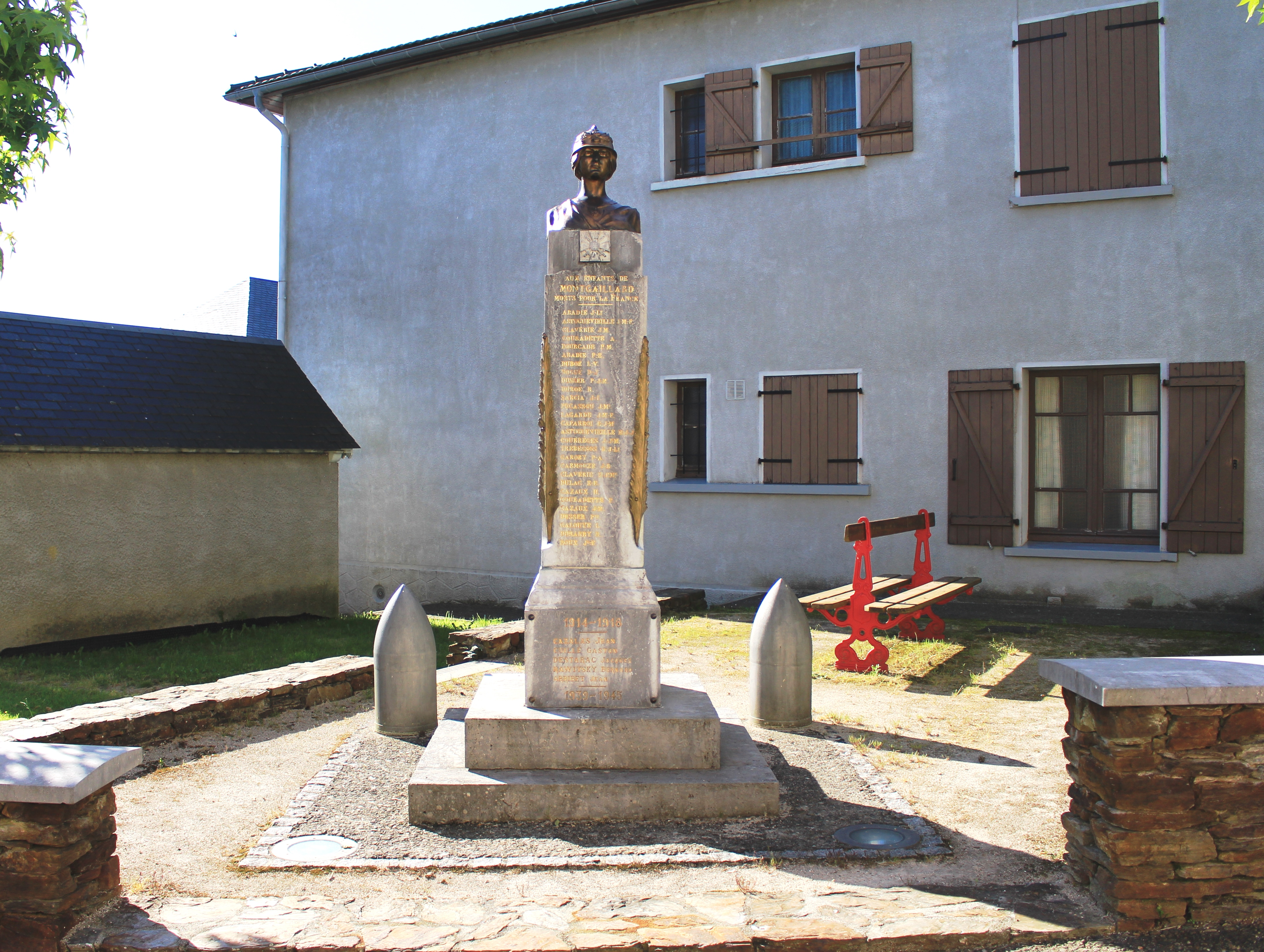 Monument aux morts de Montgaillard (Hautes-Pyrénées)